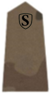 stopień